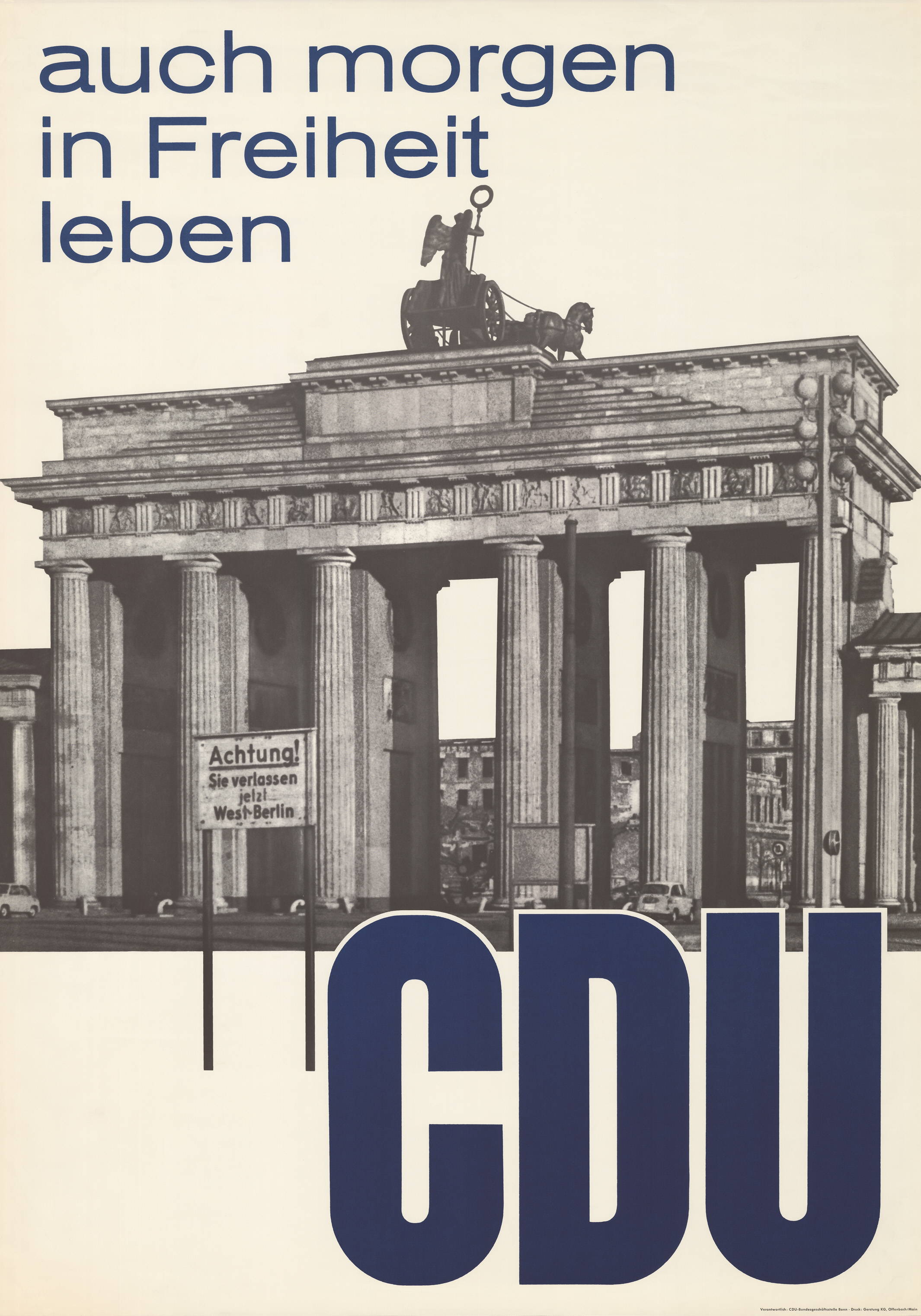 auch morgen in Freiheit leben CDUAbbildung:Brandenburger TorPlakatart:Motiv-/TextplakatKünstler_Grafiker:Werbeagentur Dr. Hegemann GmbHAuftraggeber:Verantw.: CDU-Bundesgeschäftsstelle BonnDrucker_Druckart_Druckort:Gerstung KG, Offenbach/MainObjekt-Signatur:10-001: 901Bestand:Plakate zu Bundestagswahlen (10-001)GliederungBestand10-18:Plakate zu Bundestagswahlen (10-001) » Die 4. Bundestagswahl am 17. September 1961 » MotivplakateLizenz:KAS/ACDP 10-001: 901 CC-BY-SA 3.0 DE